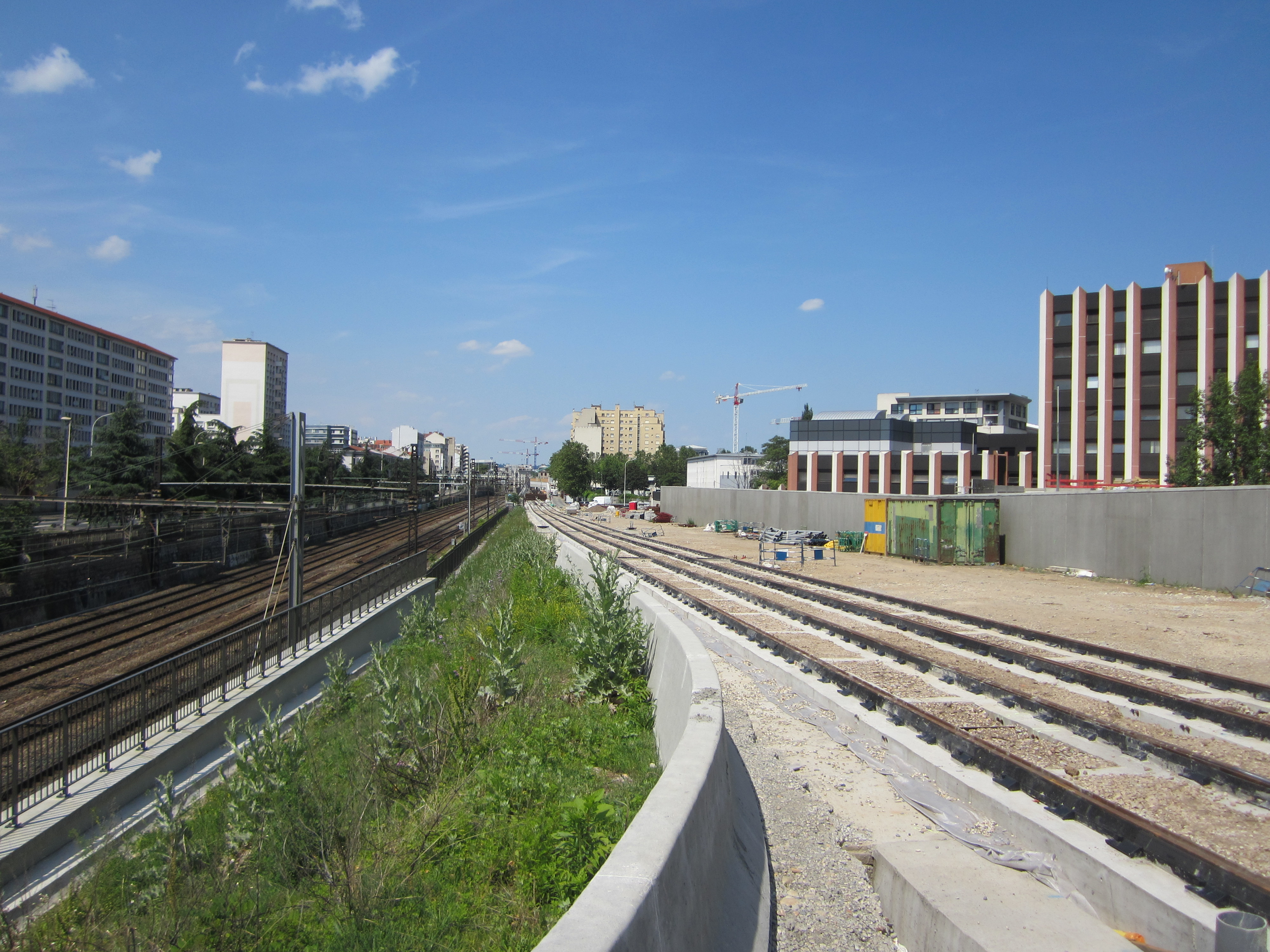 Rails de la ligne 4 du tramway de Lyon, entre les voies de chemin de fer et l'hôtel de police, au niveau de la rue Marius Berliet